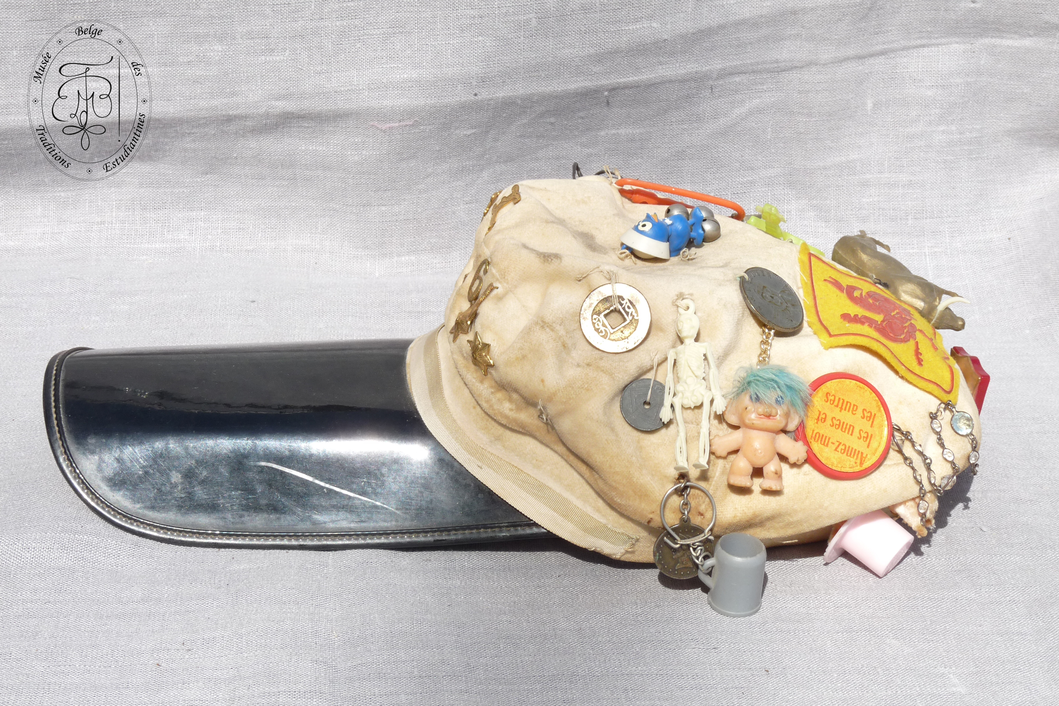 Penne d'étudiant en Philologie de l'université de Liège (portée par le professeur Robert Halleux dès 1964) Vue de côté Collection : Musée Belge des Traditions Estudiantines Don : Robert Halleux